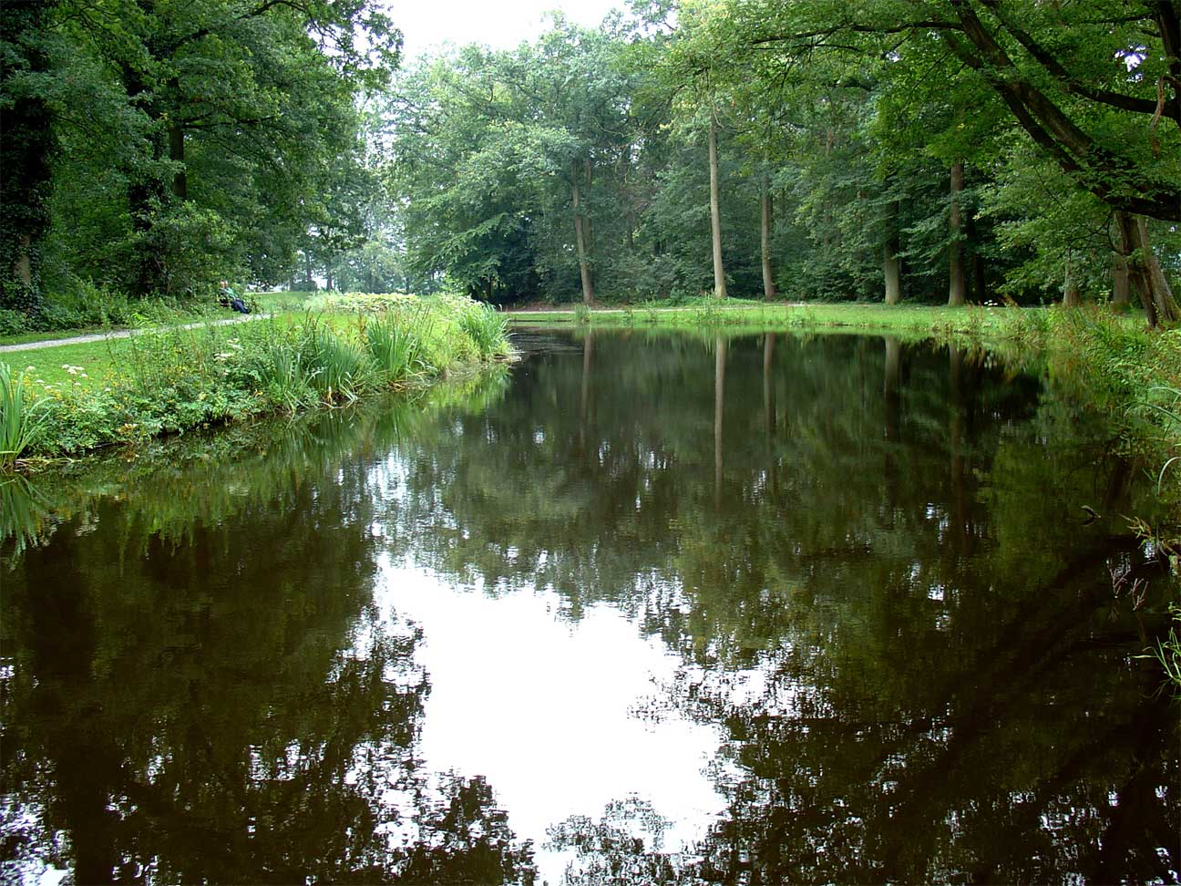 De Nieuwe Aanleg te Wolvega (ontworpen door Lucas Pieters Roodbaard)